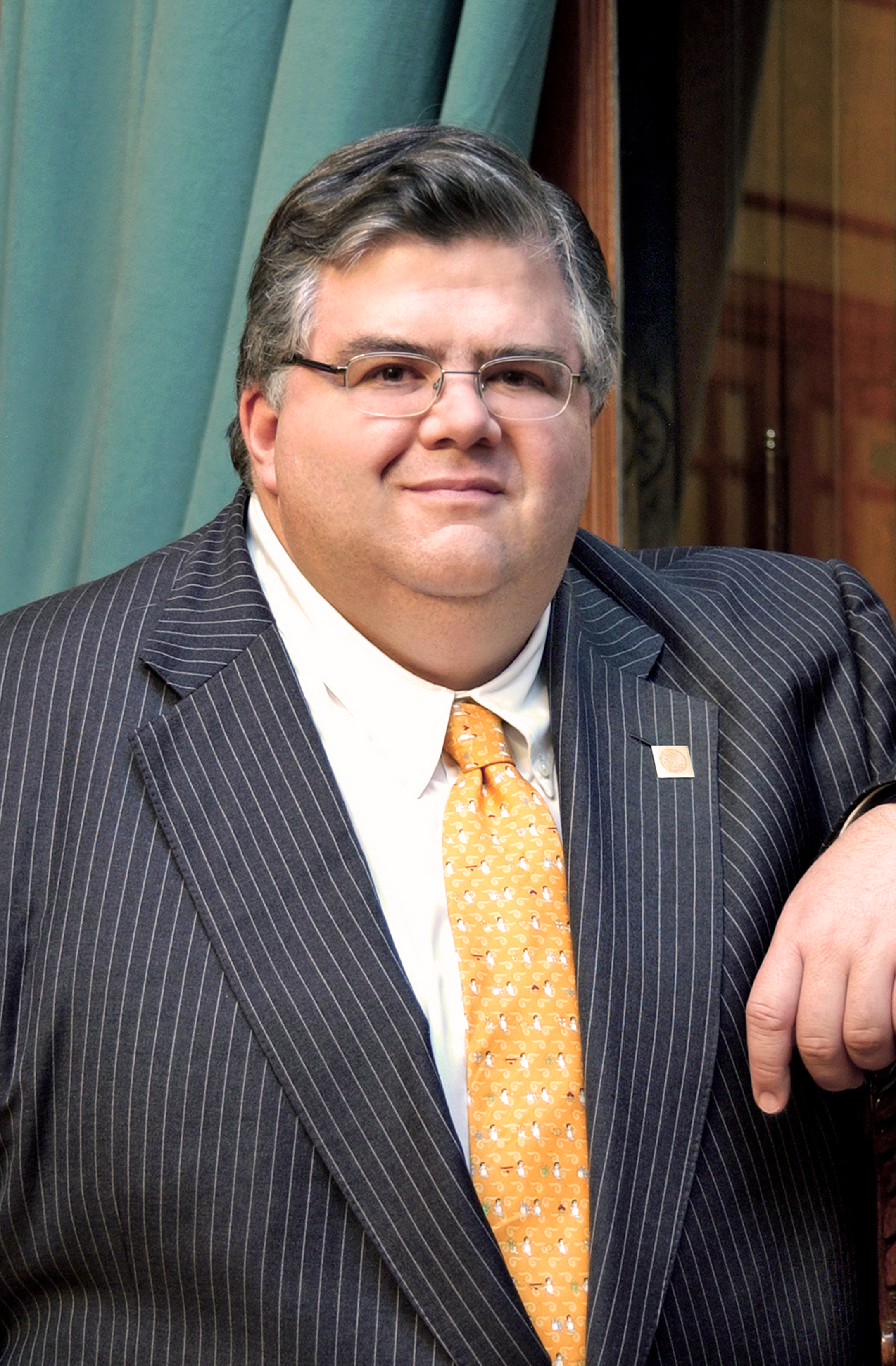 Foto gobernador del Banco de México